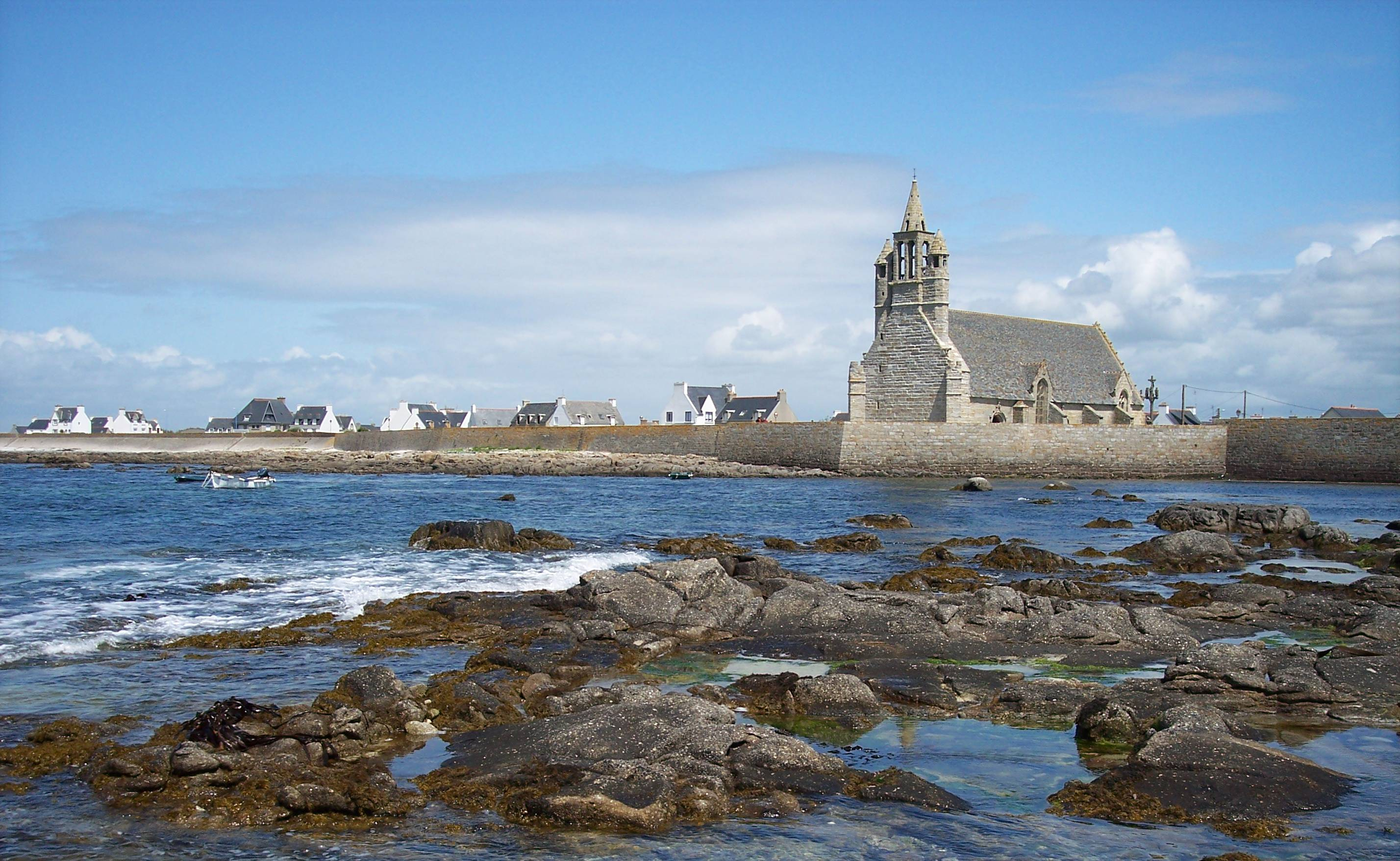 La chapelle de la Joie à Saint-Guénolé - 22/05/2006 - photo Henri Camus